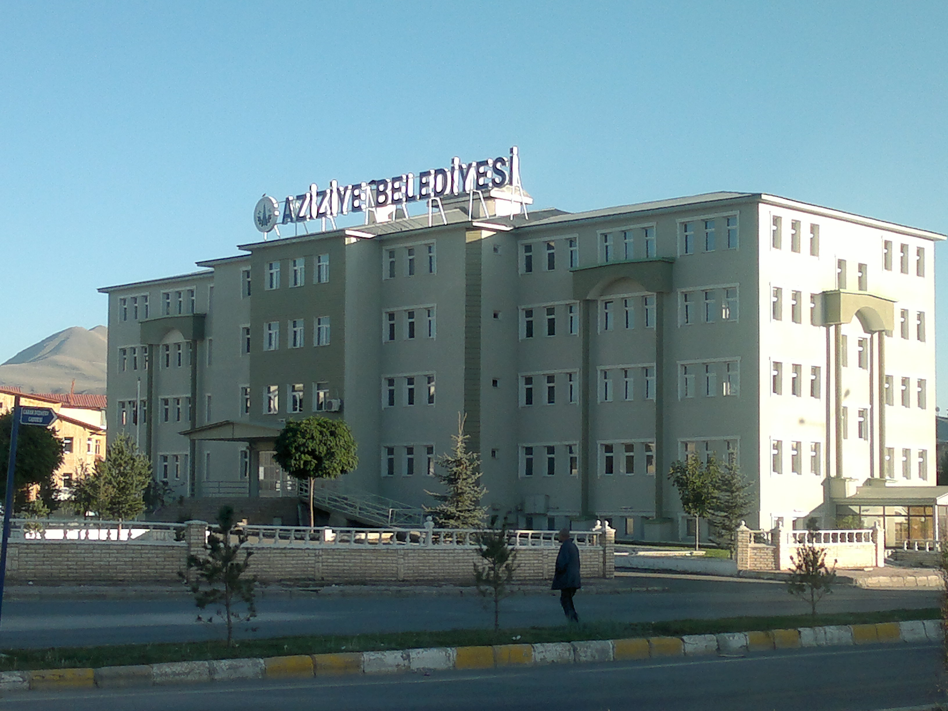 Erzurum Aziziye Belediye Hizmet Binası.